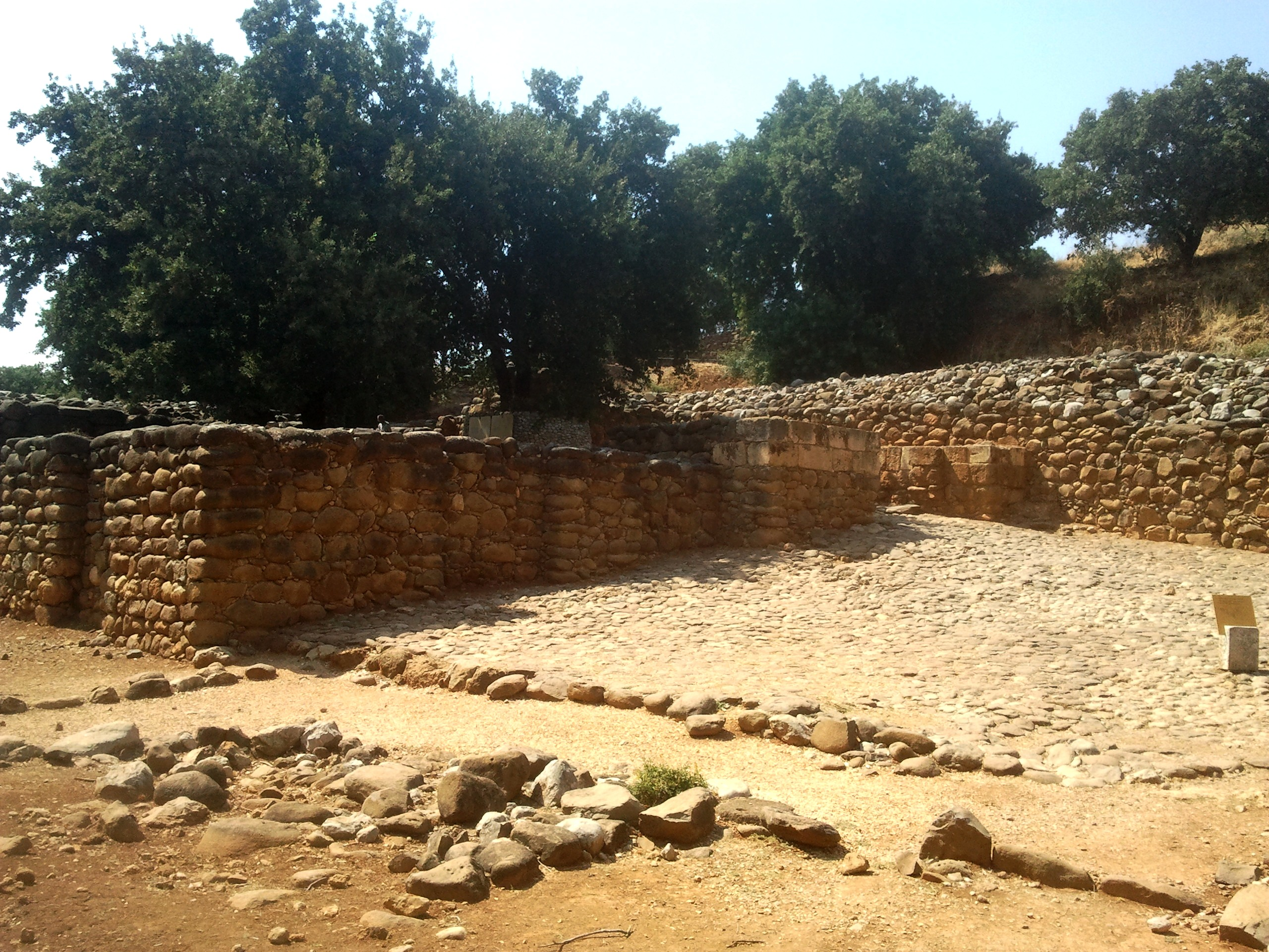 תל הנמצא כחצי קילומטר מצפון לקיבוץ דן, בתחומה של שמורת טבע תל דן בעמק החולה. גובהו 204 מטרים מעל פני הים, שטחו כ-200 דונם וצורתו כשל אליפסה בקוטר של 400 עד 500 מטרים. התל מזוהה עם העיר דן המוזכרת במקרא, ומספר אתרים בו נחפרו והעלו ממצאים ארכאולוגיים רבים וייחודיים מתקופות שונות. הכללתו של המקום כאתר מורשת עולמית נדונה בישיבות ועדת המורשת העולמית בשנת 2009 ושוב ב-2010, אך נכון לינואר 2014 אינו נכלל ברשימה. השער הישראלי